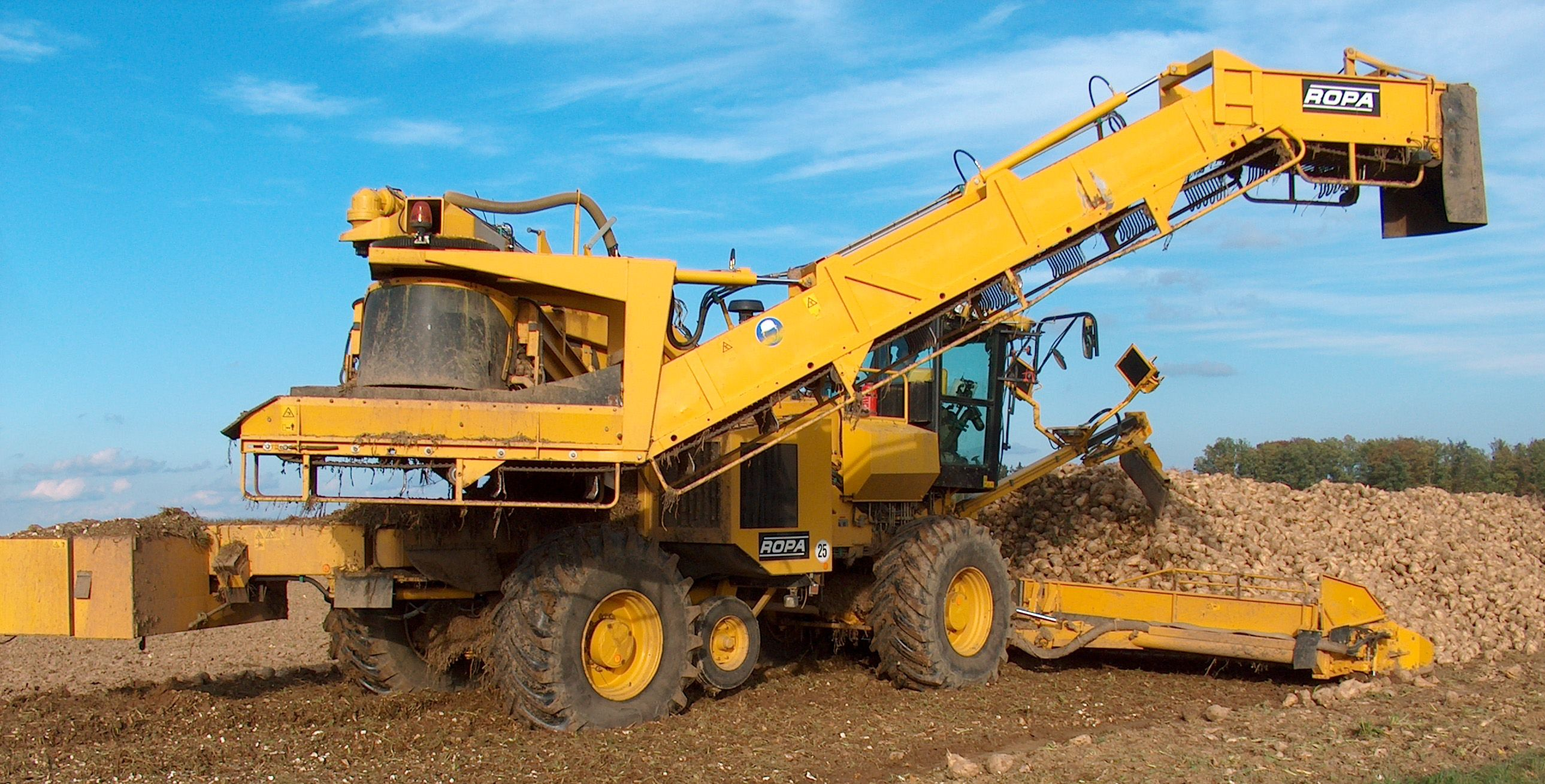 Rübenreinigungslader Euro-Maus der Firma ROPA